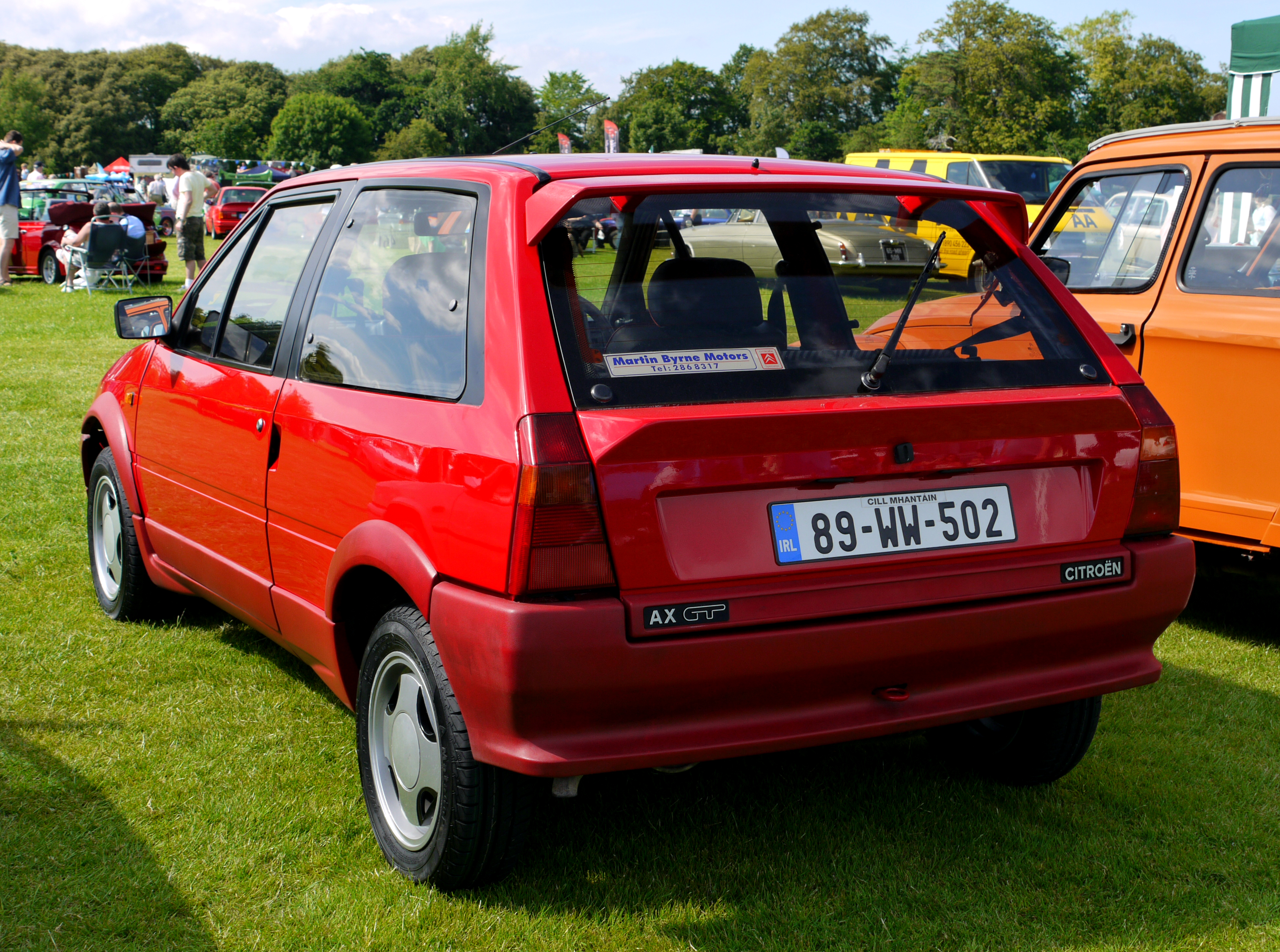 1989 Citroën AX GT.